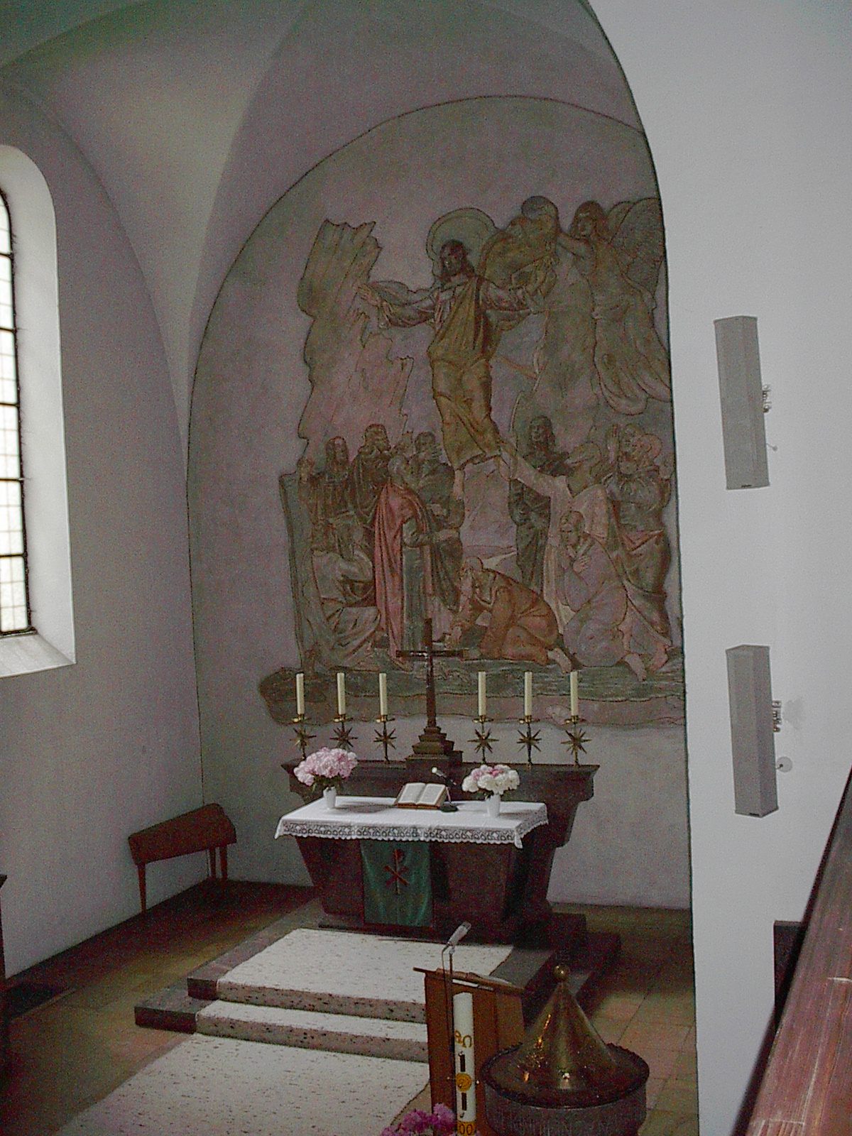 Der Altarraum der Christuskirche in Neuburg-Donau